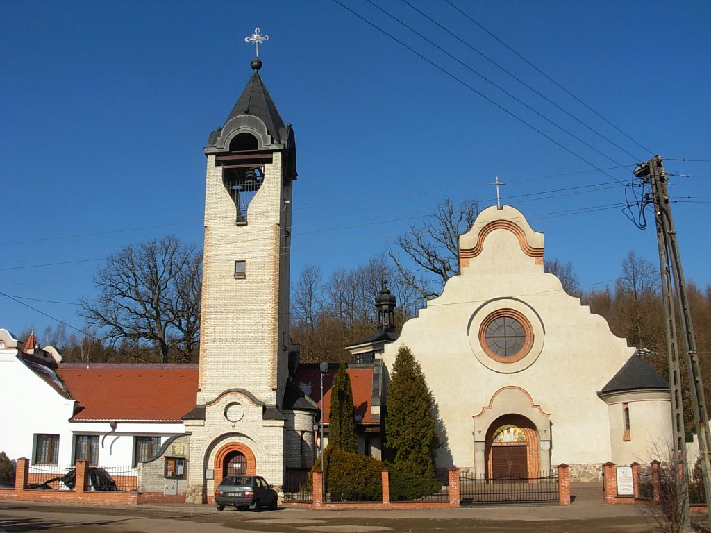 Kościół Przemienienia Pańskiego w Bydgoszczy-Smukale